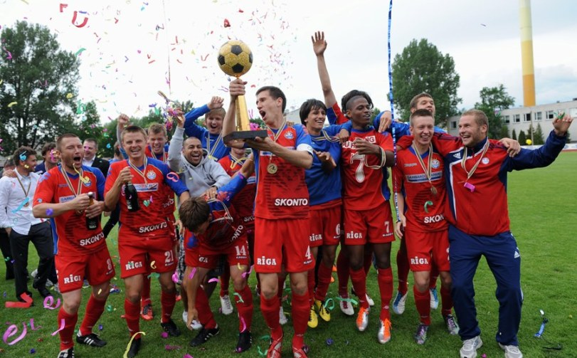 Skonto fc Baltic leauge final